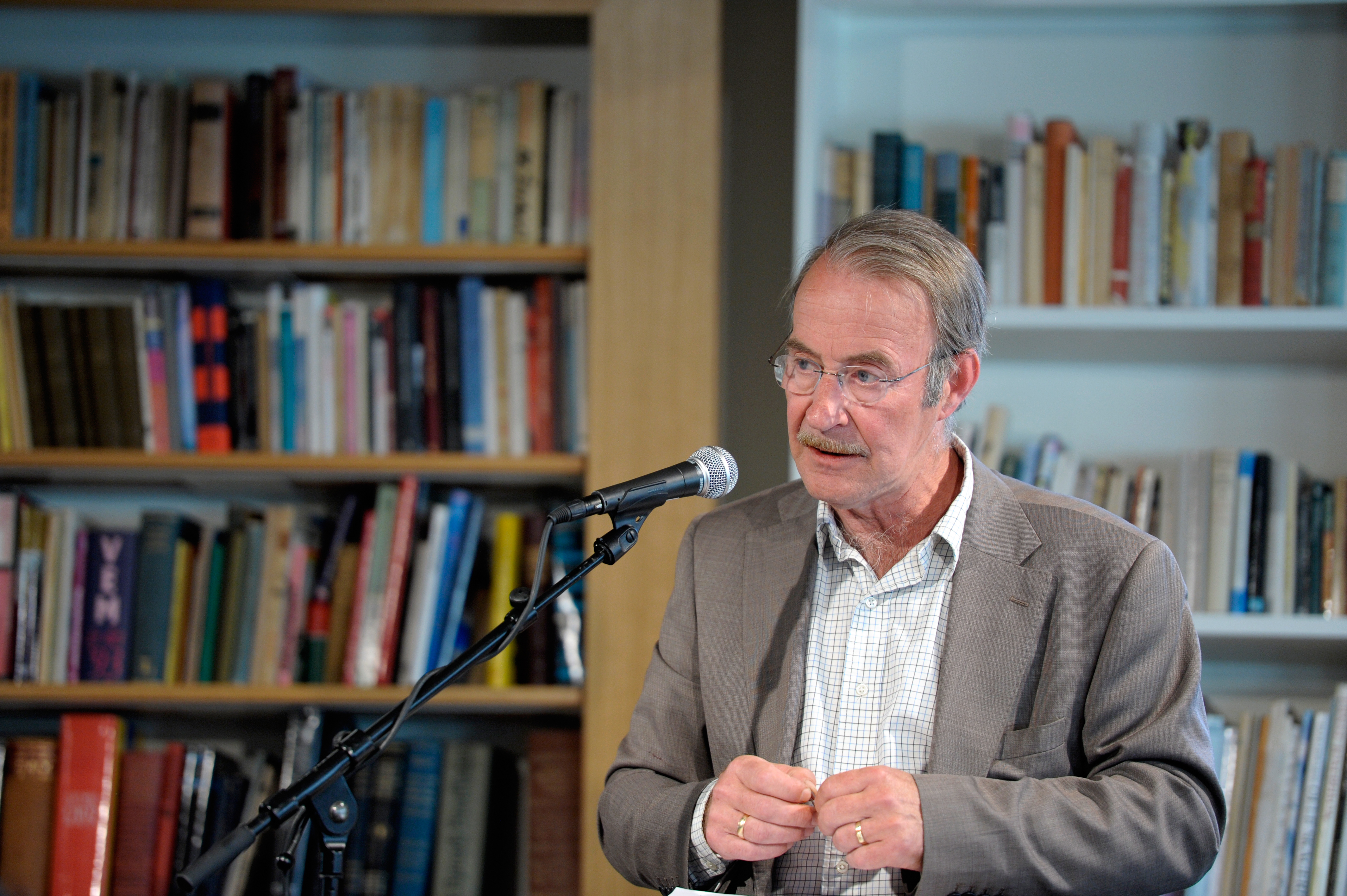 Litteraturprofessor Hans H. Skei vid ett evenmang om Nordiska rådets litteraturpris i Oslo 2011-04-11.